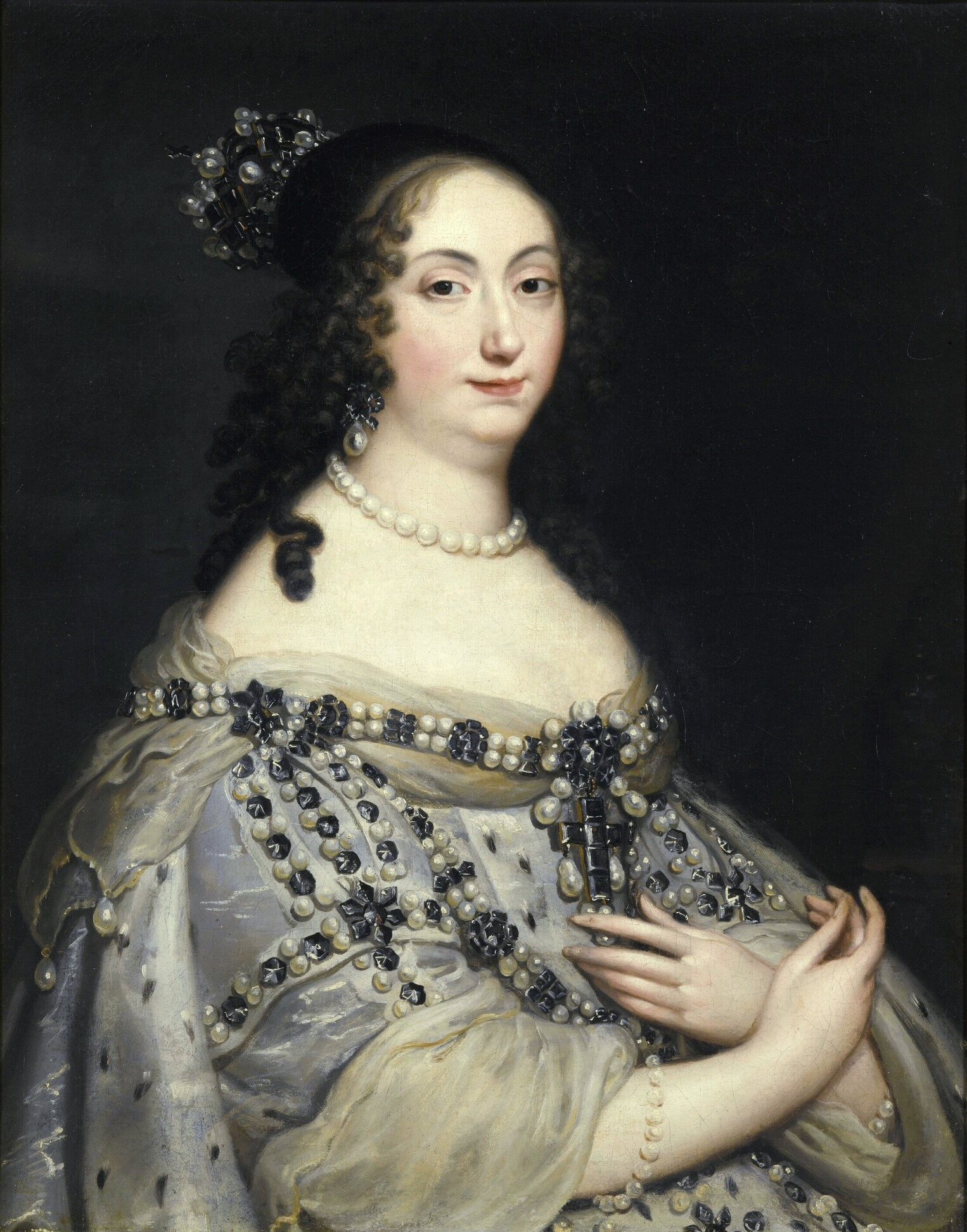 Portrait of Louise Marie Gonzaga de Nevers, Queen of Poland.label QS:Len,"Portrait of Louise Marie Gonzaga de Nevers, Queen of Poland." label QS:Lpl,"Portret królowej Ludwiki Marii Gonzaga de Nevers." label QS:Lfr,"Portrait de Louise Marie Gonzague de Nevers , reine de Pologne."